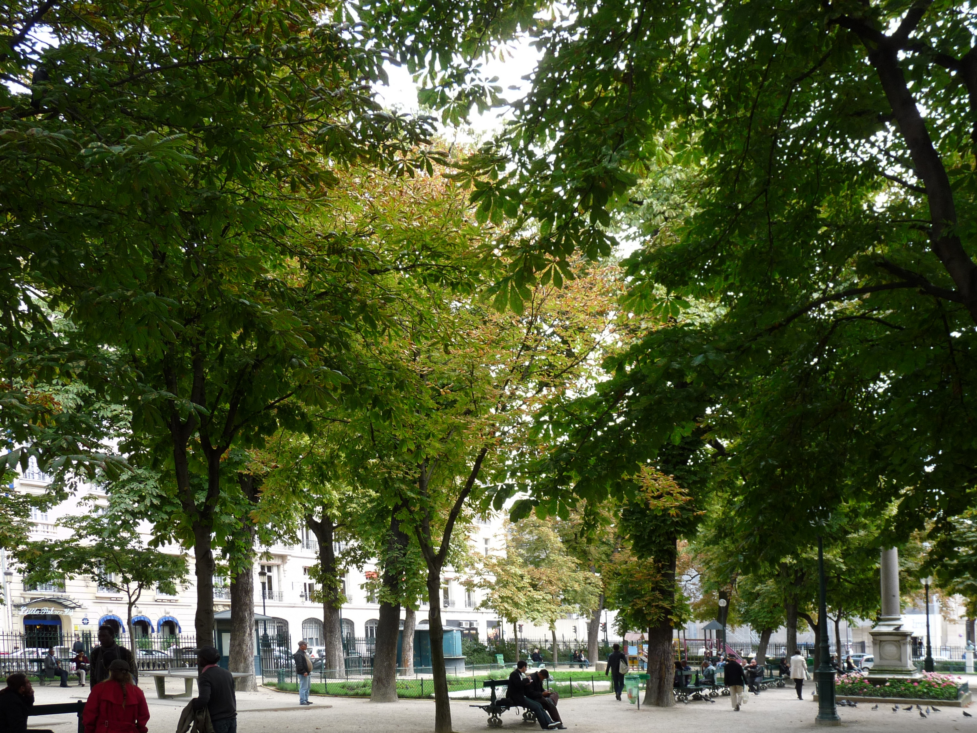 Le square Émile Chautemps à Paris, vue de son entrée par le boulevard Sébastopol.